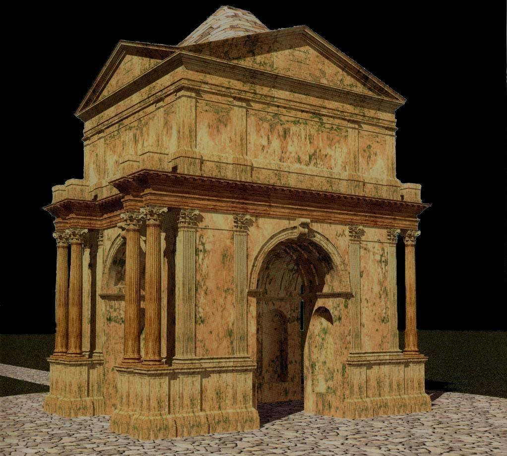 Ricostruzione tridimensionale realizzata dai prof. Alberto e Marco Carpiceci